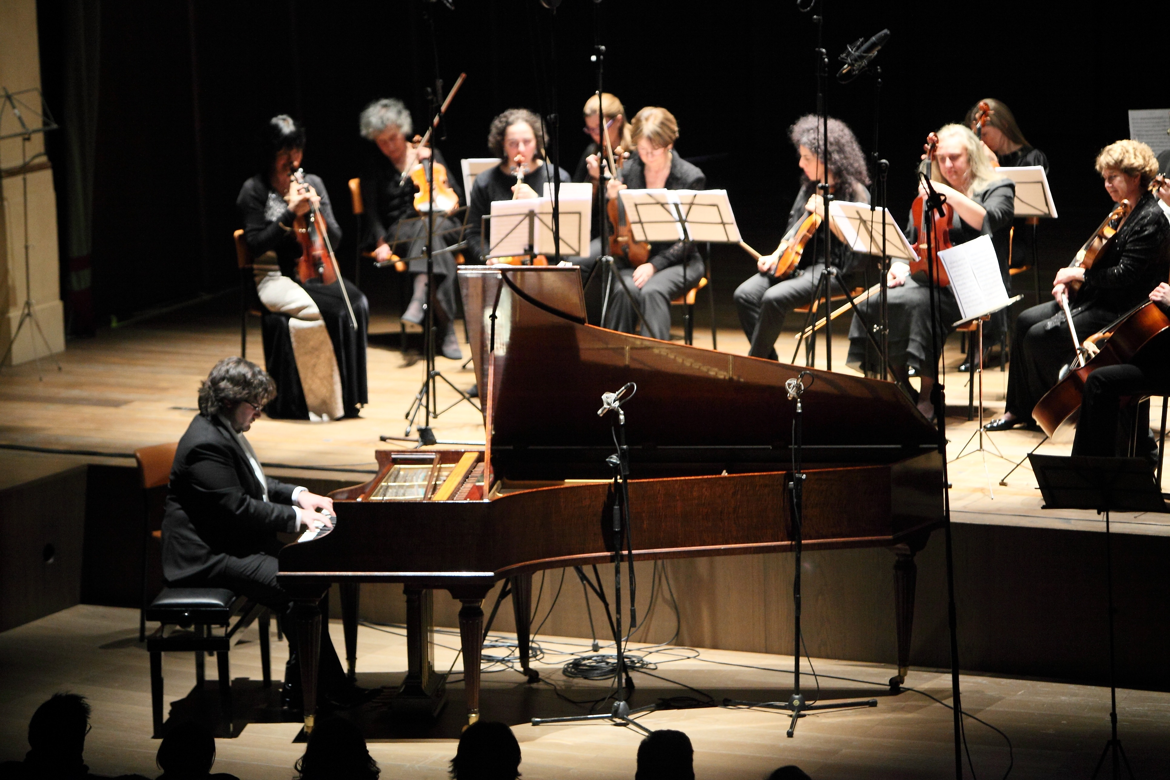 Une très rare occasion de voir et écouter en concert (à Vérone, en Italie en décembre 2012) le clavecin Grand Modèle de concert “Wanda Landowska” parfaitement restauré sous la direction de Claude Mercier-Ythier. Il s'agit ici d'un instrument exceptionnel, commandé personnellement par Wanda Landowska depuis les États-Unis en 1957.